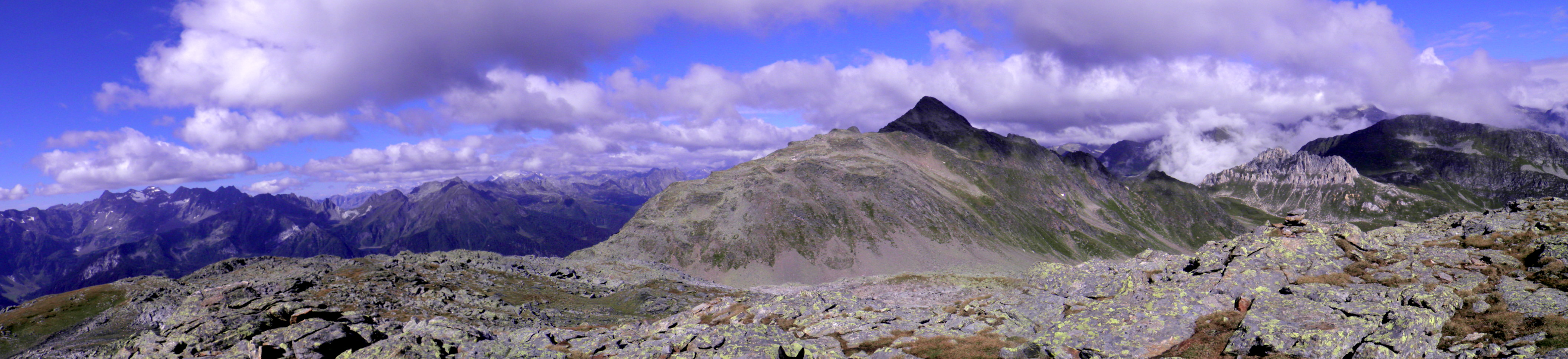 Pizzo Sole Canton Ticino Svizzera